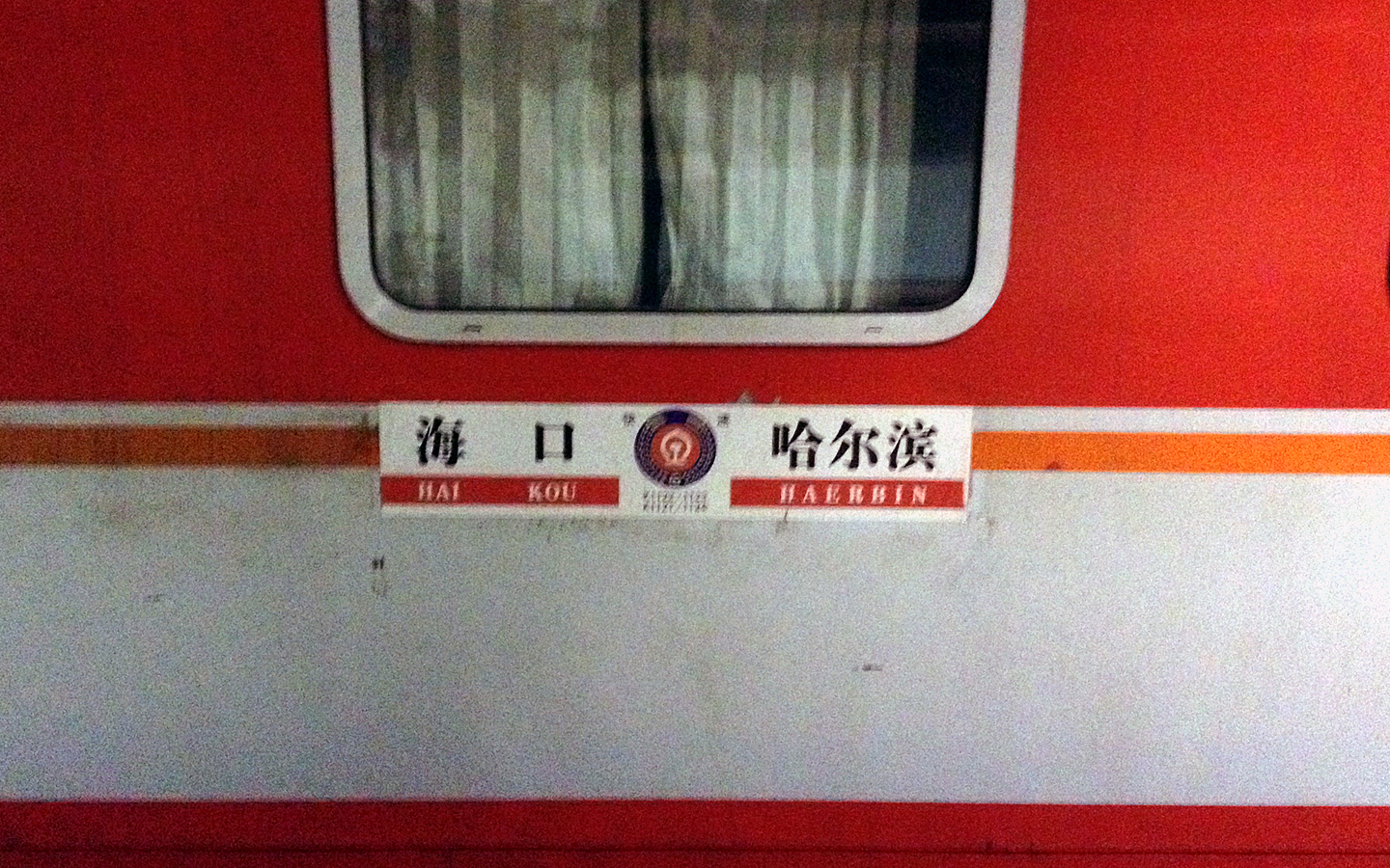 海口至哈尔滨列车水牌